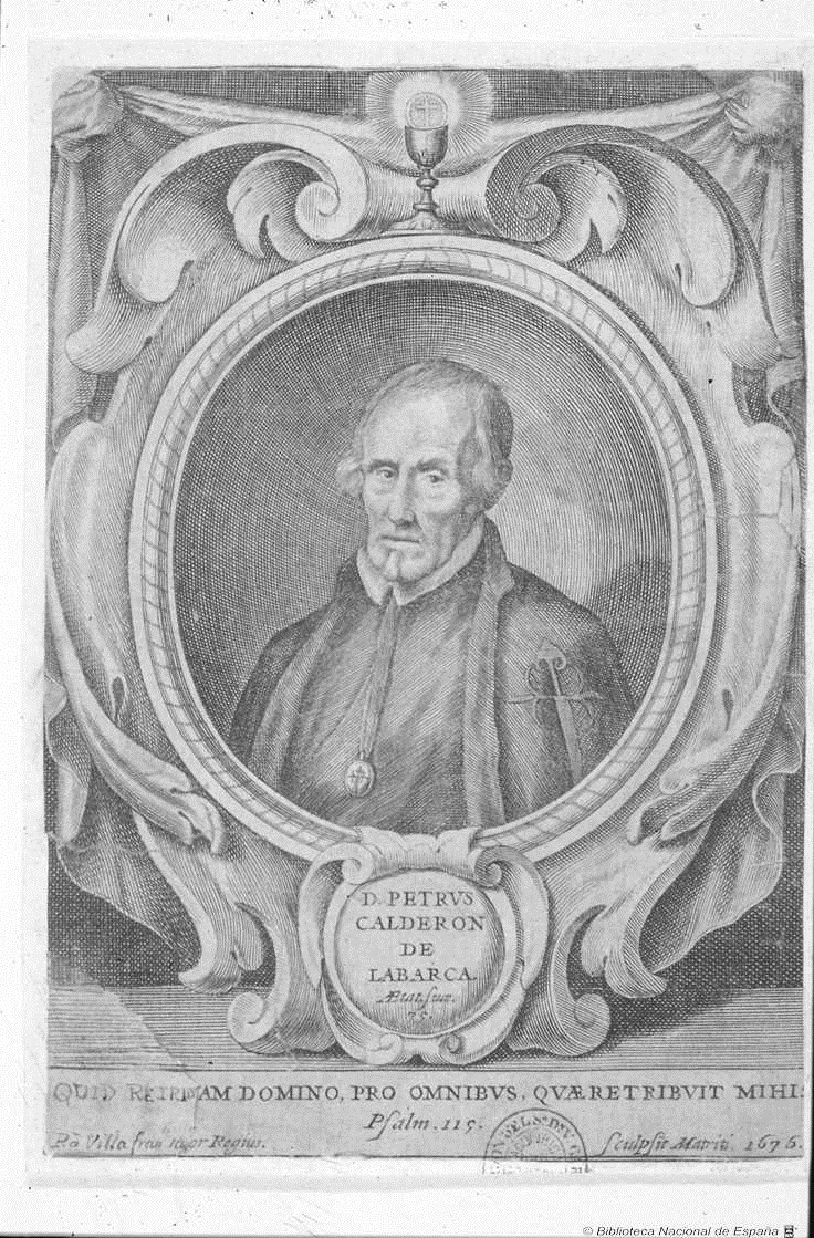 Retrato de Pedro Calderón de la Barca, grabado calcográfico, 180 x 130 mm, en la Imprenta Imperial por José Fernández de Buendía, Madrid, 1676 (Biblioteca Nacional, Madrid)